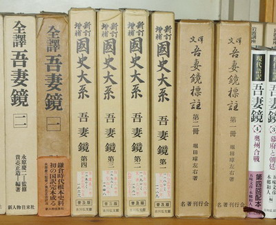 『吾妻鏡』諸本